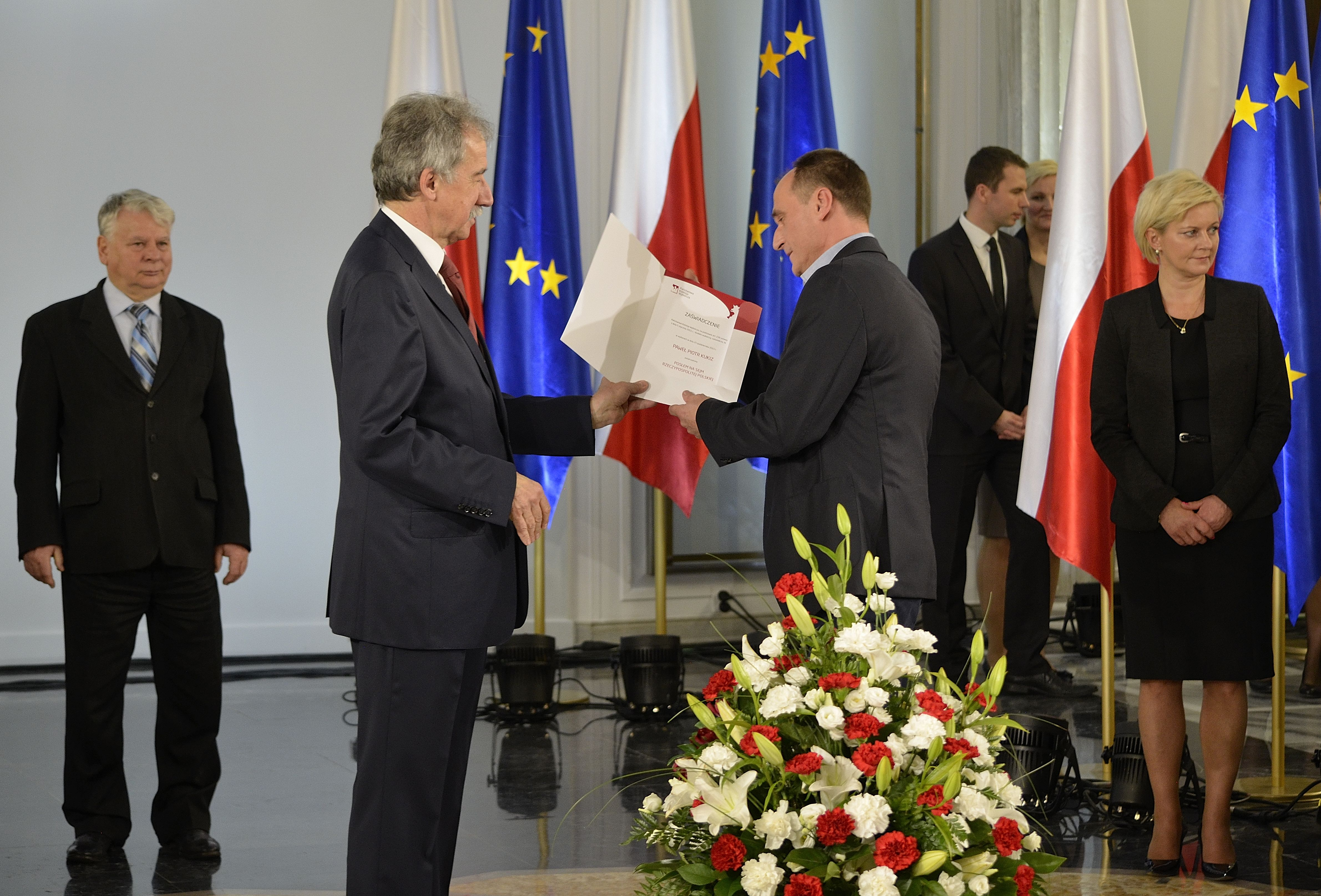 Poseł Paweł Kukiz podczas uroczystości wręczenia zaświadczeń o wyborze nowo wybranym posłom w Sali Kolumnowej Sejmu